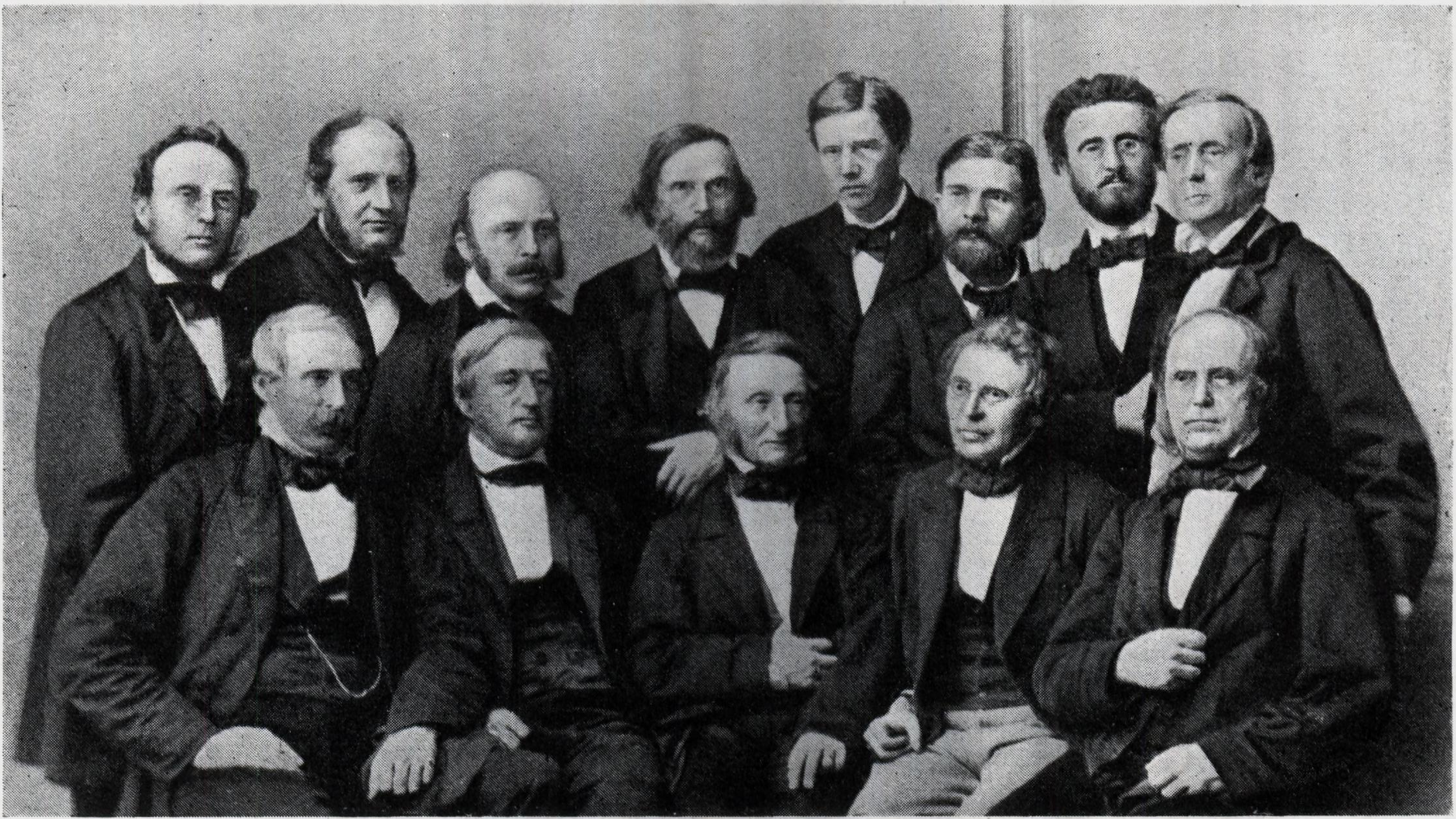 Det matematisk-naturvitenskapelige fakultet ved Universitetet i Christiania i 1861, ved Christopher Hansteens avskjed. Fra venstre bak: Schübeler, Münster, Christie, Sexe, Kjerulf, Waage, Bjerknes, Fearnley. Fra venstre foran: Broch, M. Sars, Hansteen, Rasche, L. Esmark.